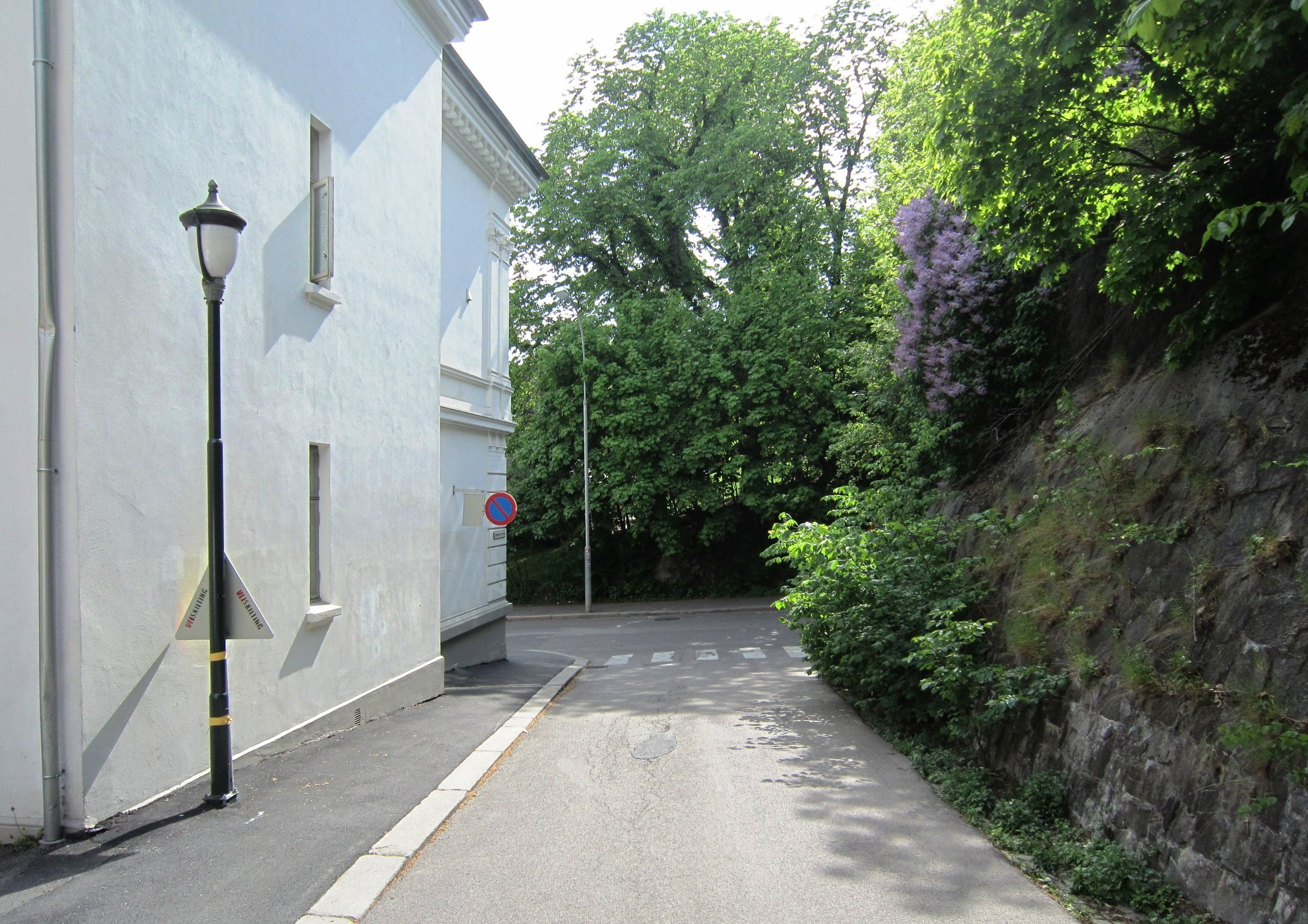 Uranienborg terrasse mot Uranienborgveien